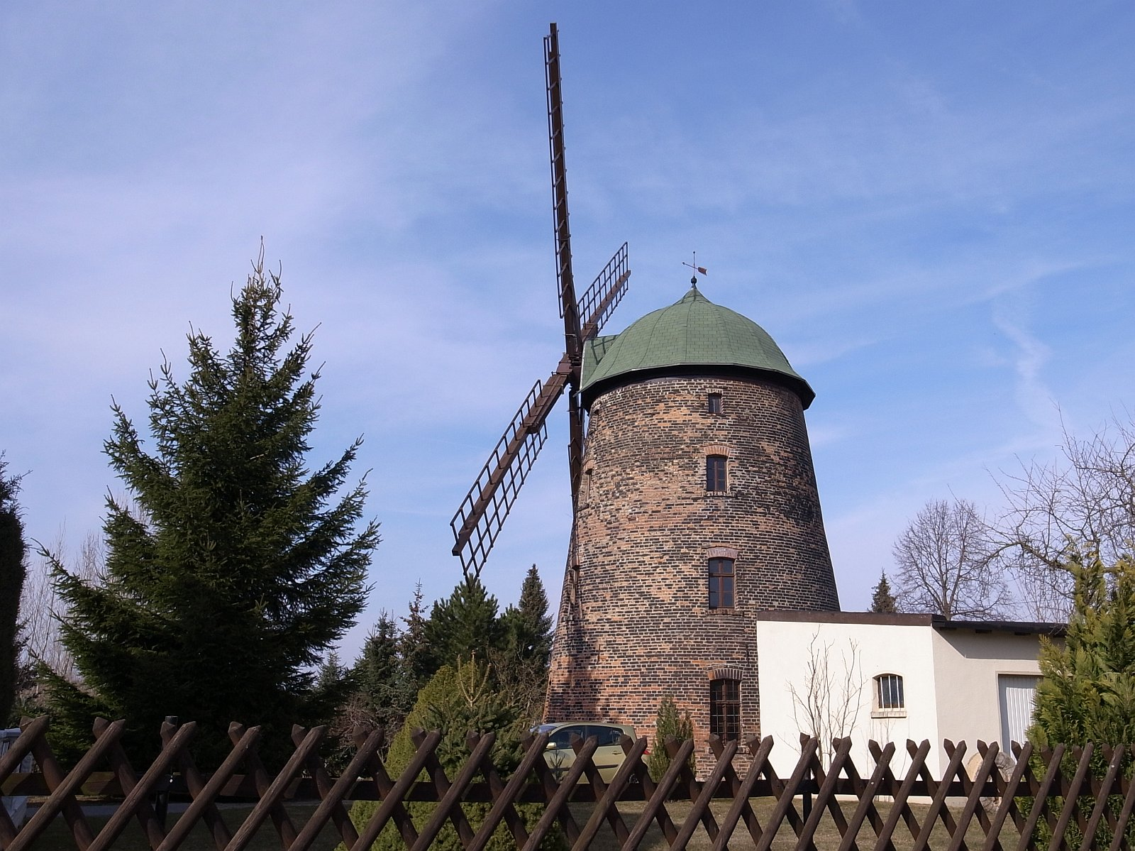 Tagewerben_Windmühle